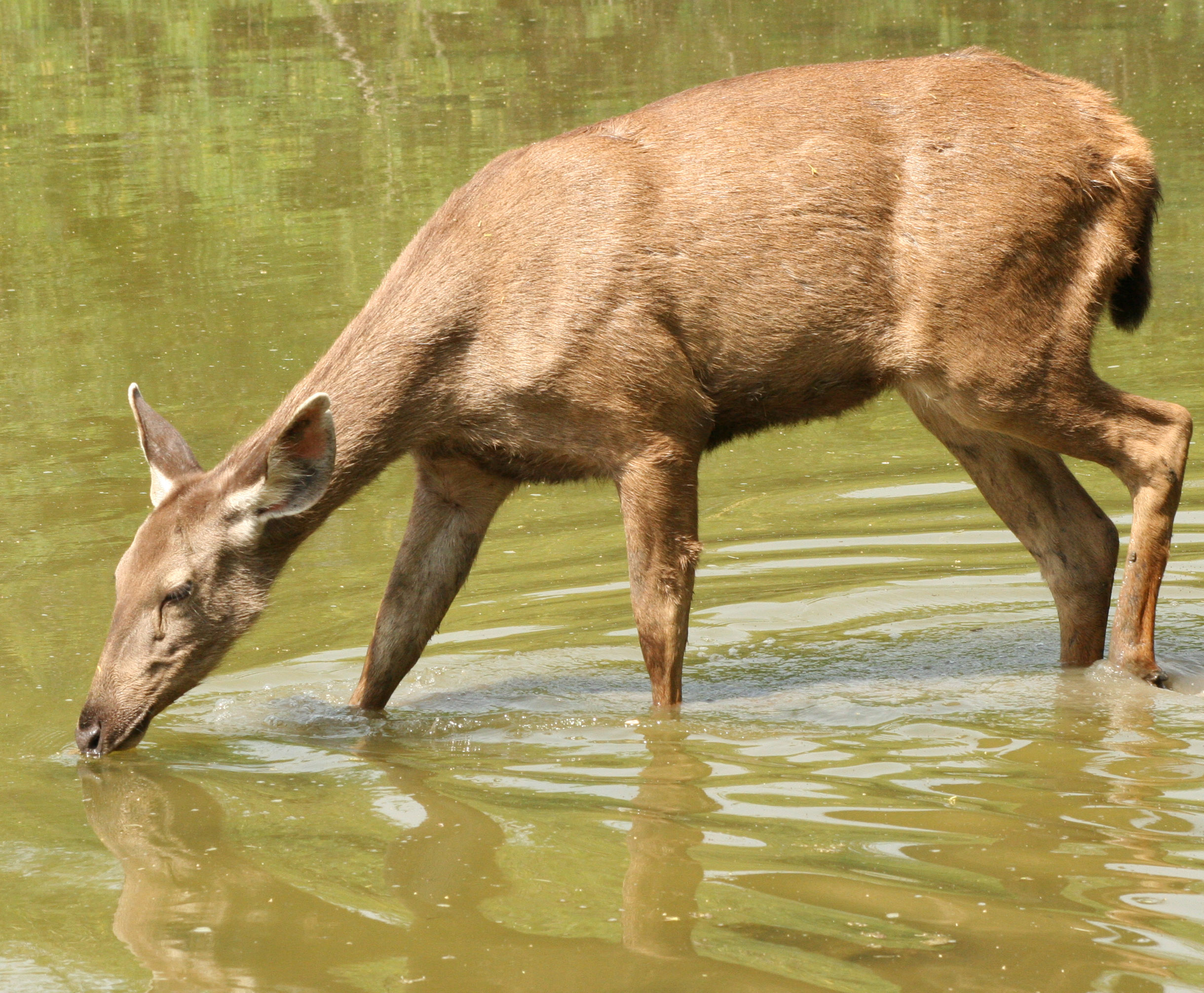 Sambar Deer in Keoladeo National Park, India.